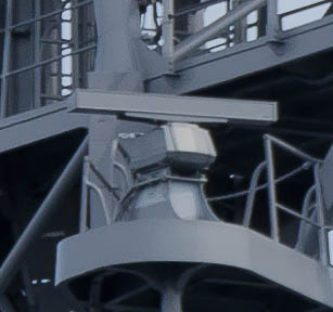 護衛艦「ありあけ」（JS Ariake, DD-109）搭載のOPS-20。